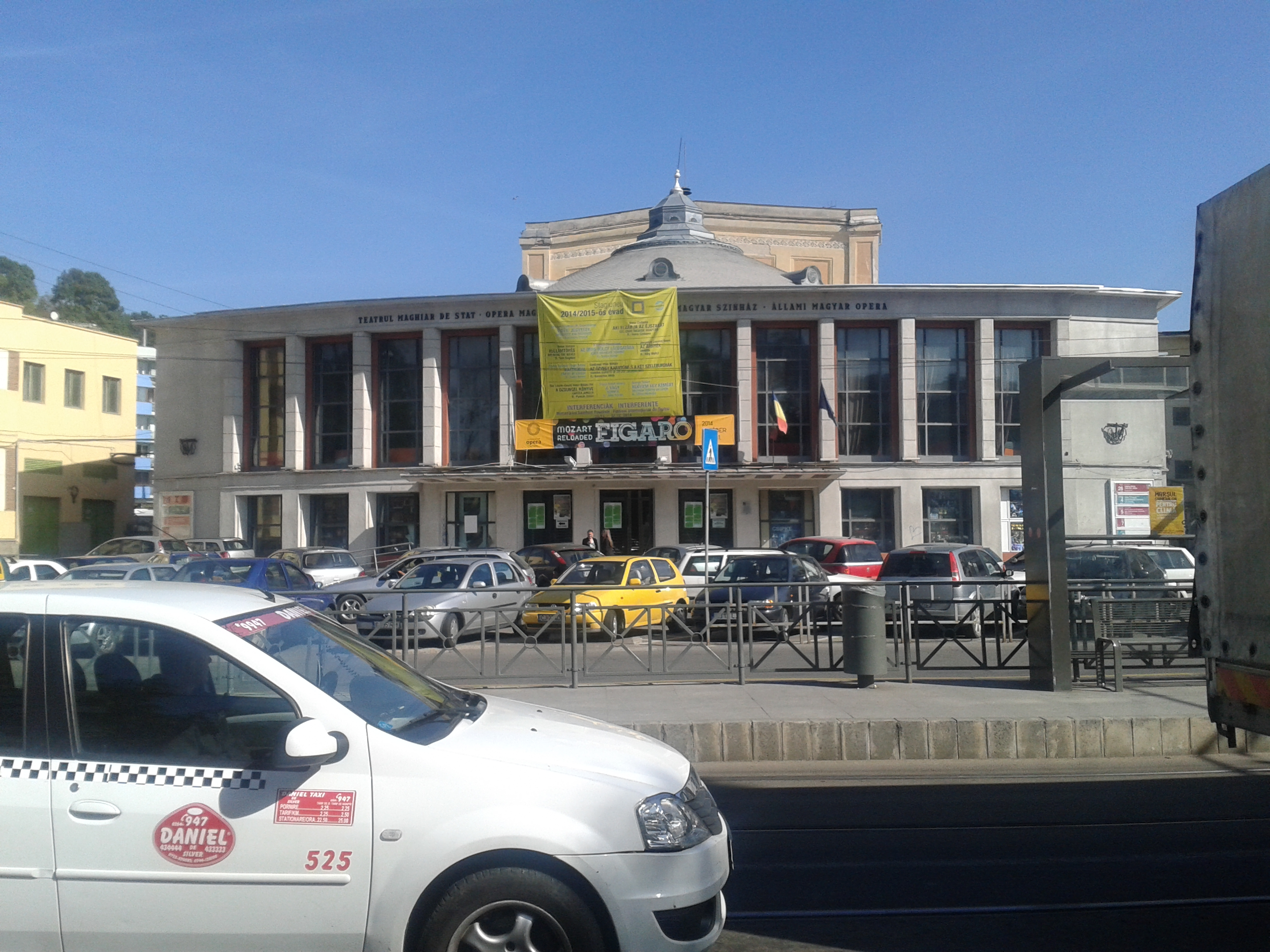 Teatrul Maghiar din Cluj Napoca